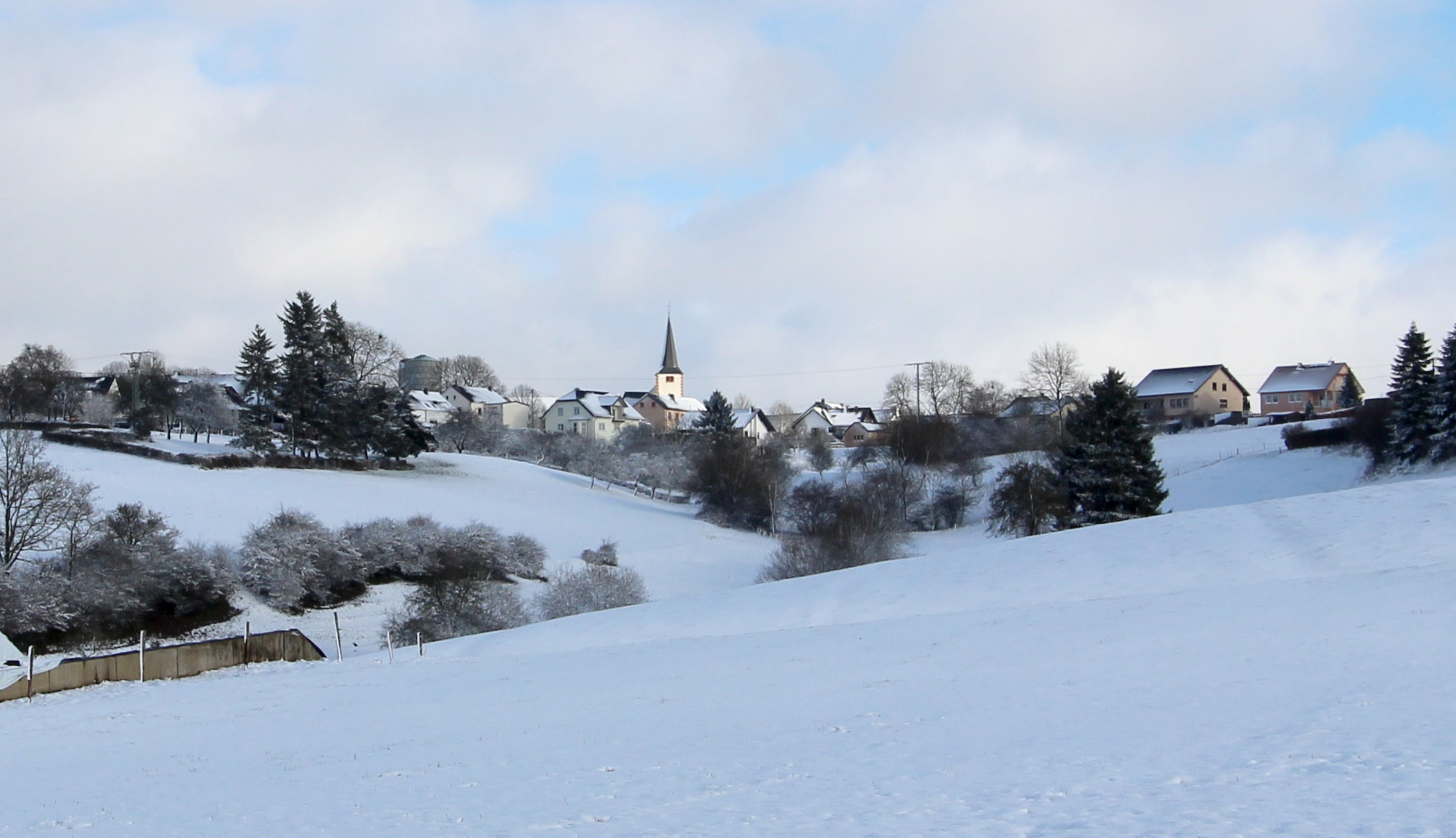 54608 Brandscheid, bei Zum Brandscheider Hof 13. Panoramablick von Westen auf Brandscheid. Aufnahme von 2017.